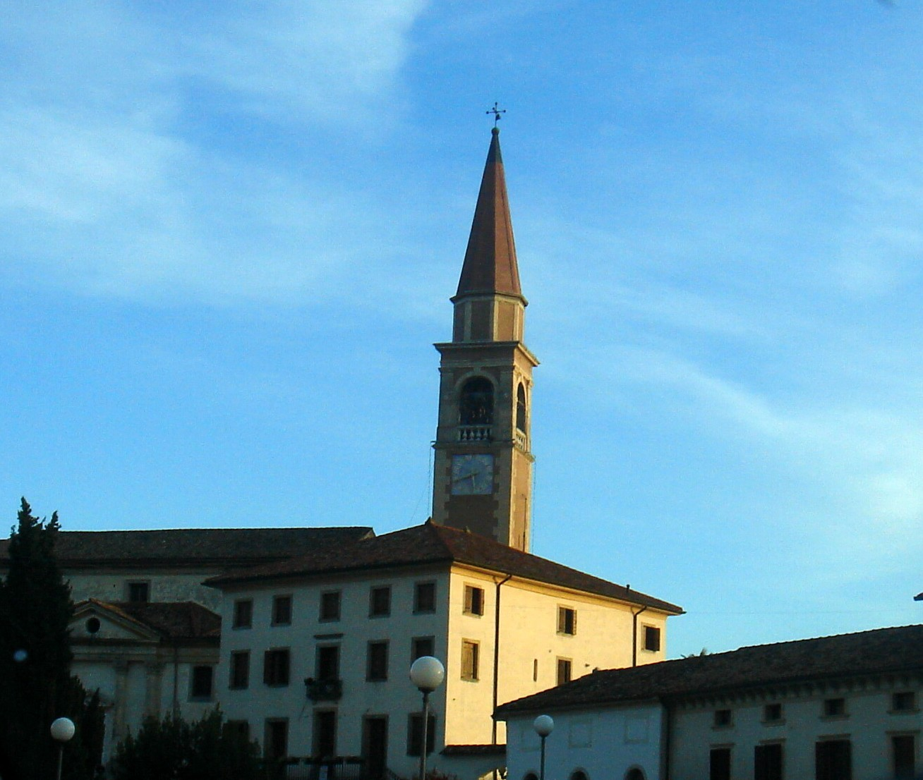 Cappella Maggiore (TV): campanile della chiesa parrocchiale.